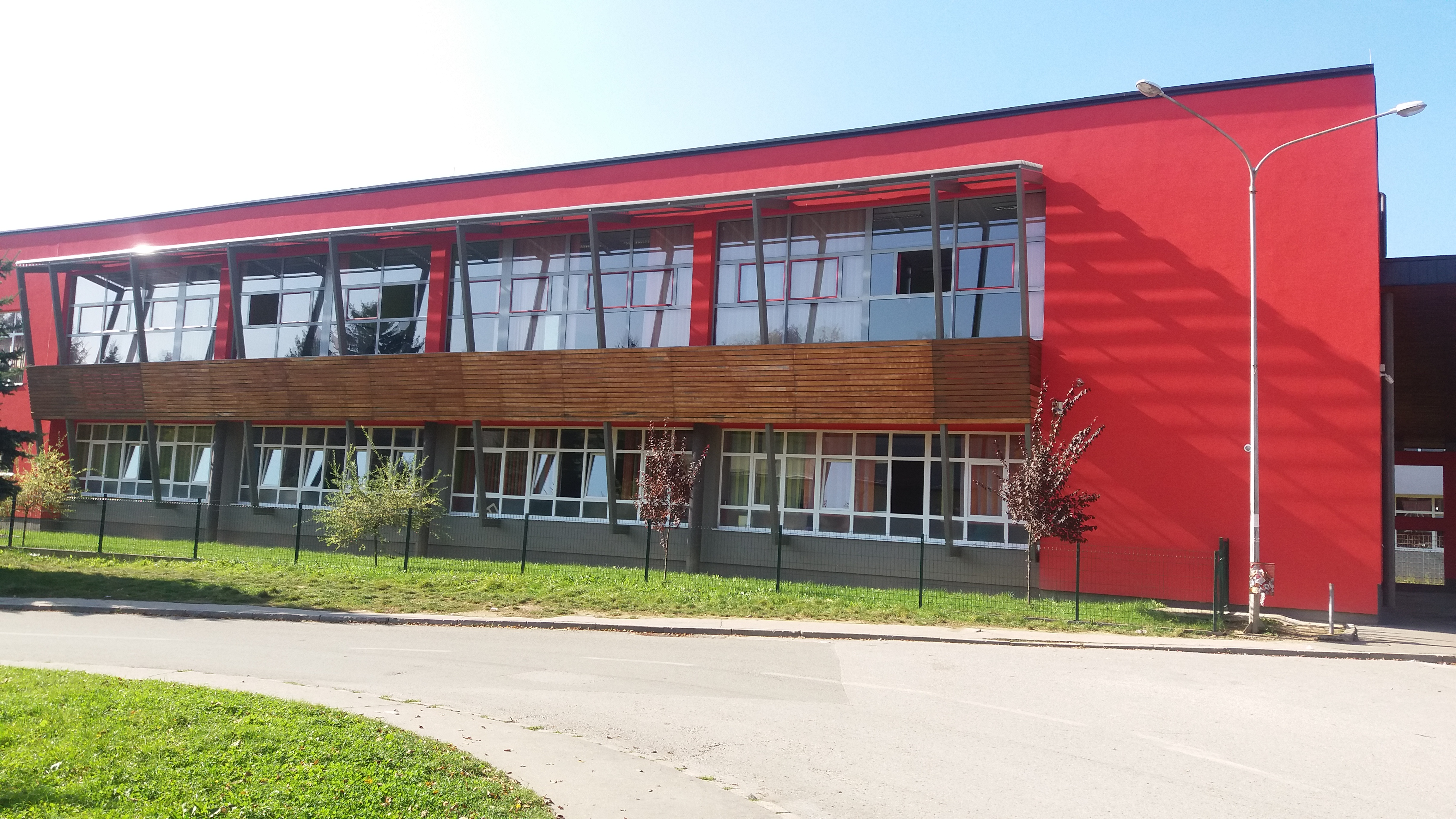 Osnovna škola Vitez